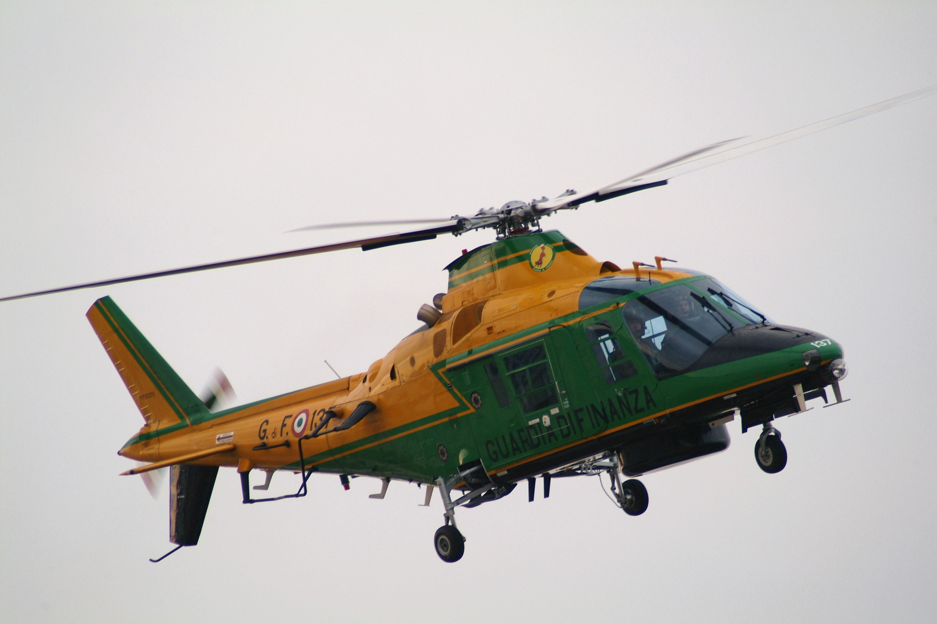 MM81370 GF-137 Agusta A-109A-II Centro Aviaziono GdF